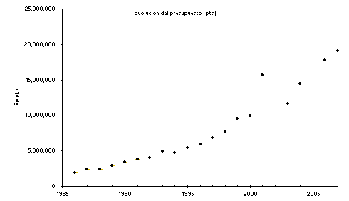 Evolución del presupuesto municipal anual en euros